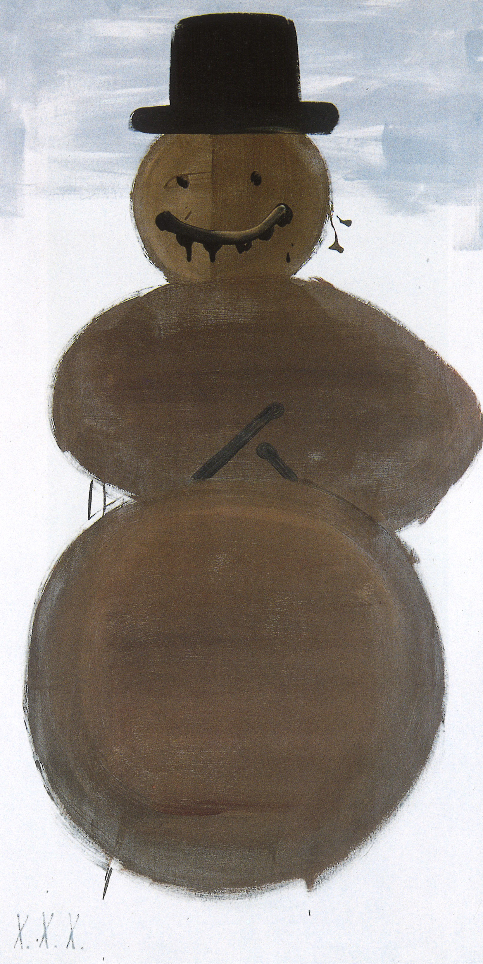 1998, 178 x 89, Acryl auf Leinwand Galeria Salvatore + Caroline Ala, Mailand